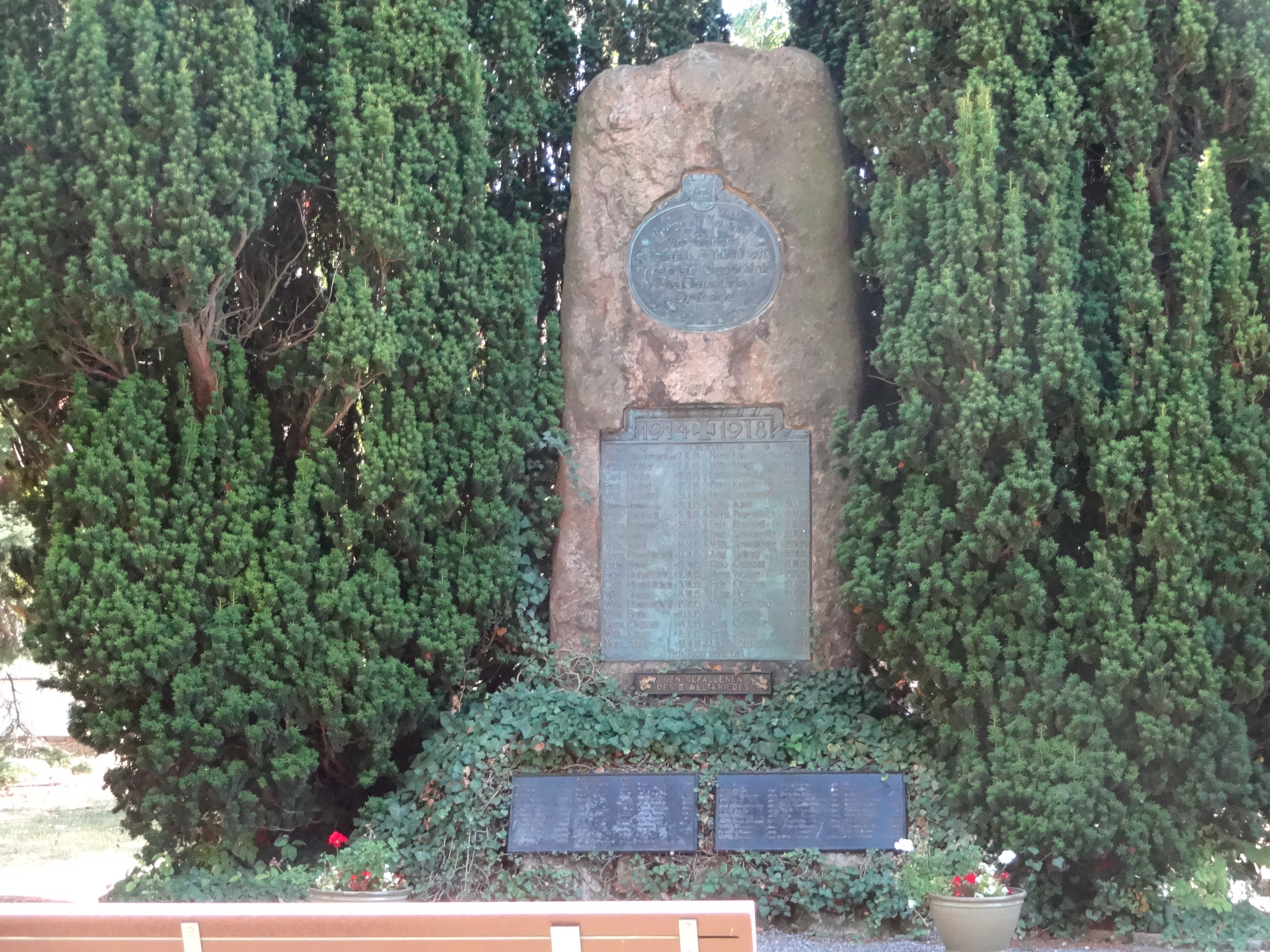 denkmalgeschütztes Kriegerdenkmal für die Gefallenen des Ersten Weltkriegs in Drübeck